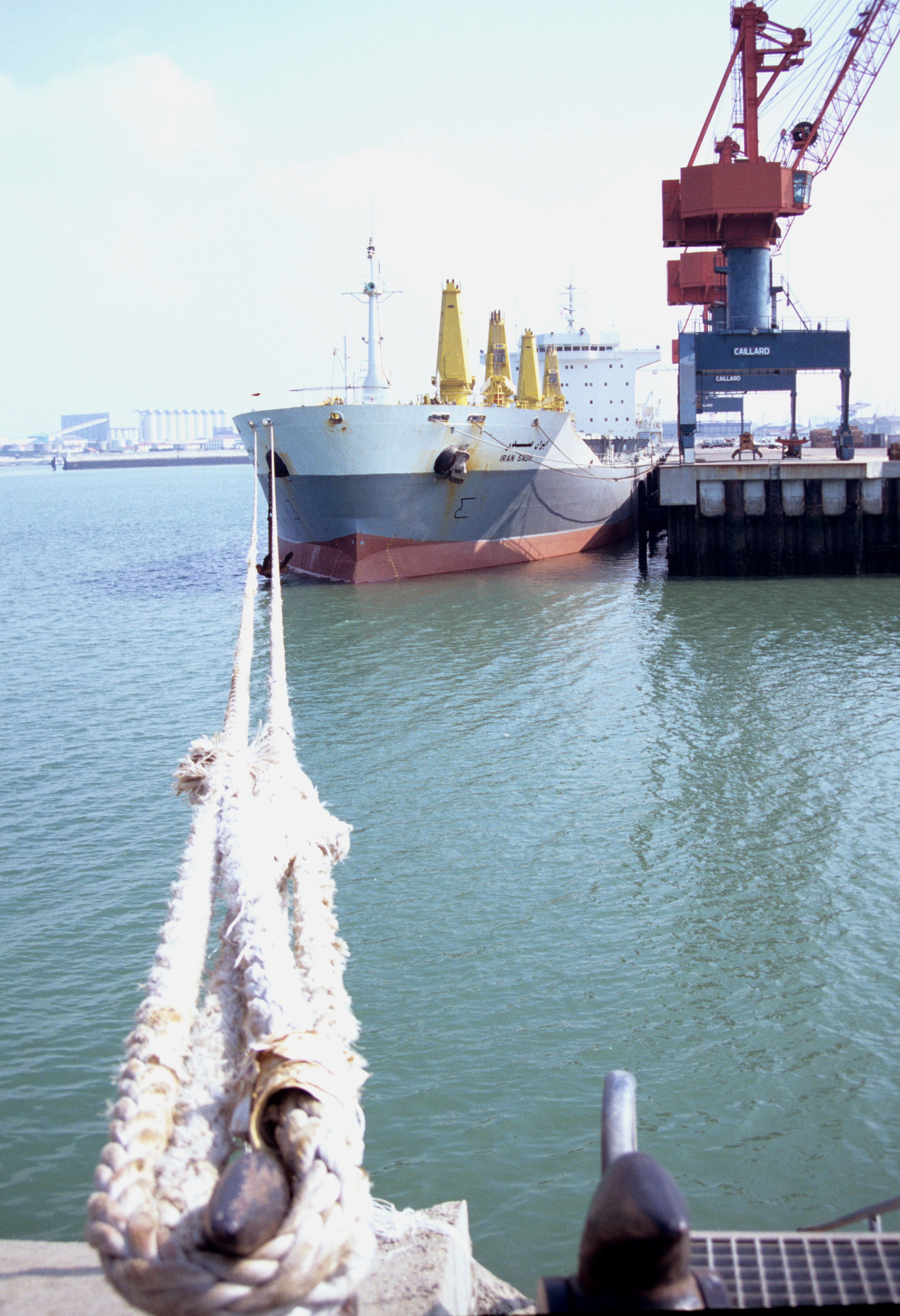 Le navire cargo iranien "Iran Sadr" en escale au port de La Pallice. Ce navire est un vraquier (bulk carrier) contruit en Corée par Daewoo et lancé en 1985. Il appartient (2009) à la compagnie de navigation Islamic Republic of Iran Shipping Lines. IMO 8320121. En persan, "Iran Sadr" s' écrit ایران صدر. Port de commerce de La Rochelle-Pallice, La Rochelle, Charente Maritime, France.